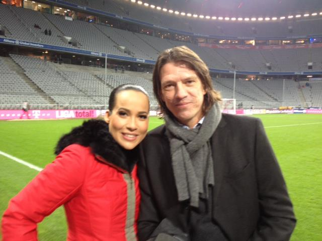 This my Photo! Nandini Mitra und Christian Ziege in der Allianz Arena München beim Bundesligaspiel, 15. Spieltag, FC Bayern München - Borussia Dortmund am 1. Dez. 2012, Moderation Eurosport